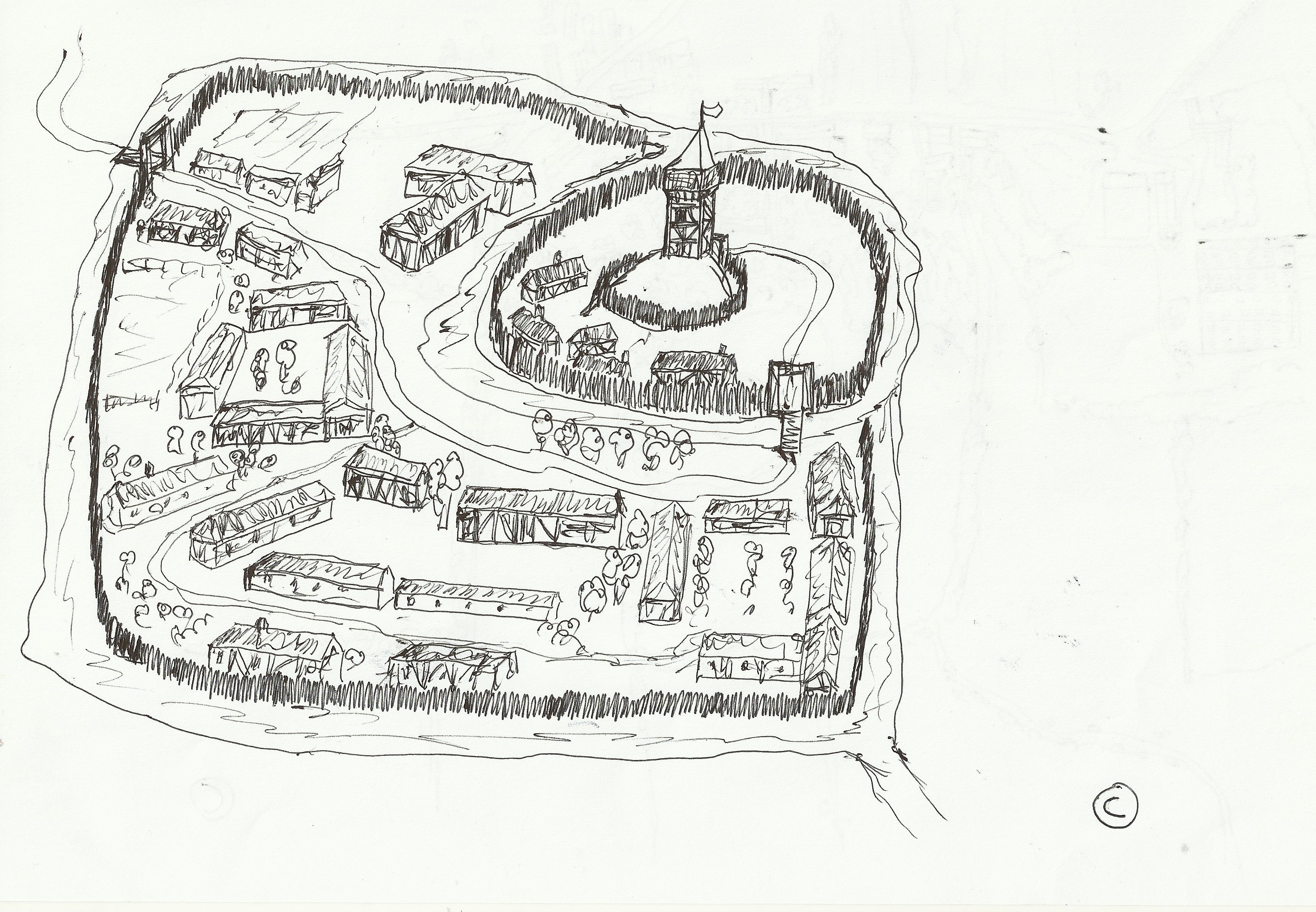 Reconstitution possible de la motte castrale de Longeville sur mer, par analyse de la vue aérienne et la disposition des fossés.